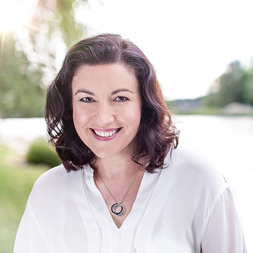 Dorothee Bär, MdB im September 2017